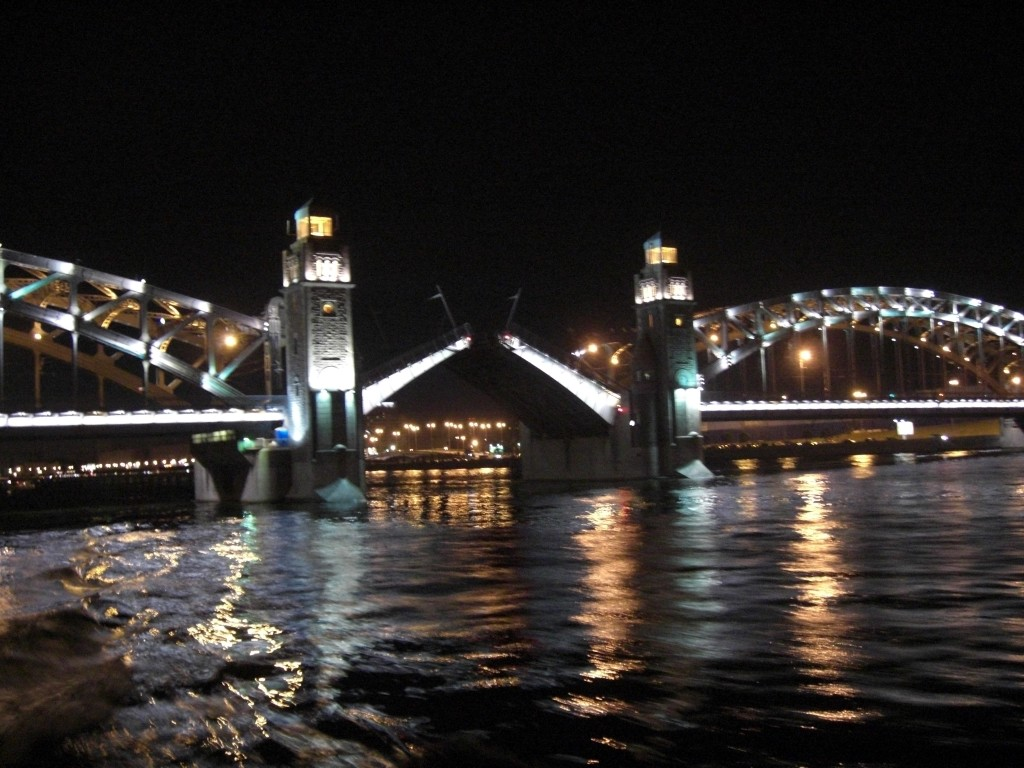 Большеохтинский мост в Санкт-Петербурге в процессе развода